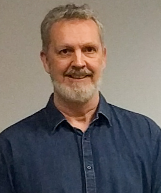 Lars Rasmussen